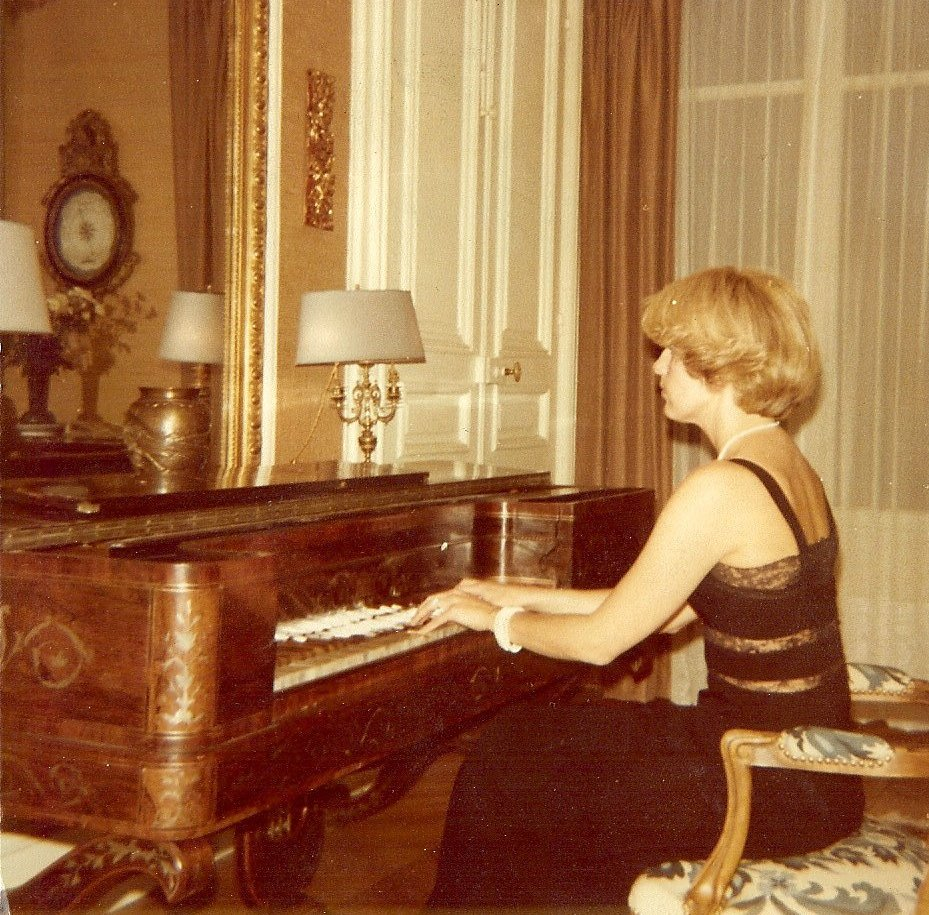 Brigitte François-Sappey au piano forte